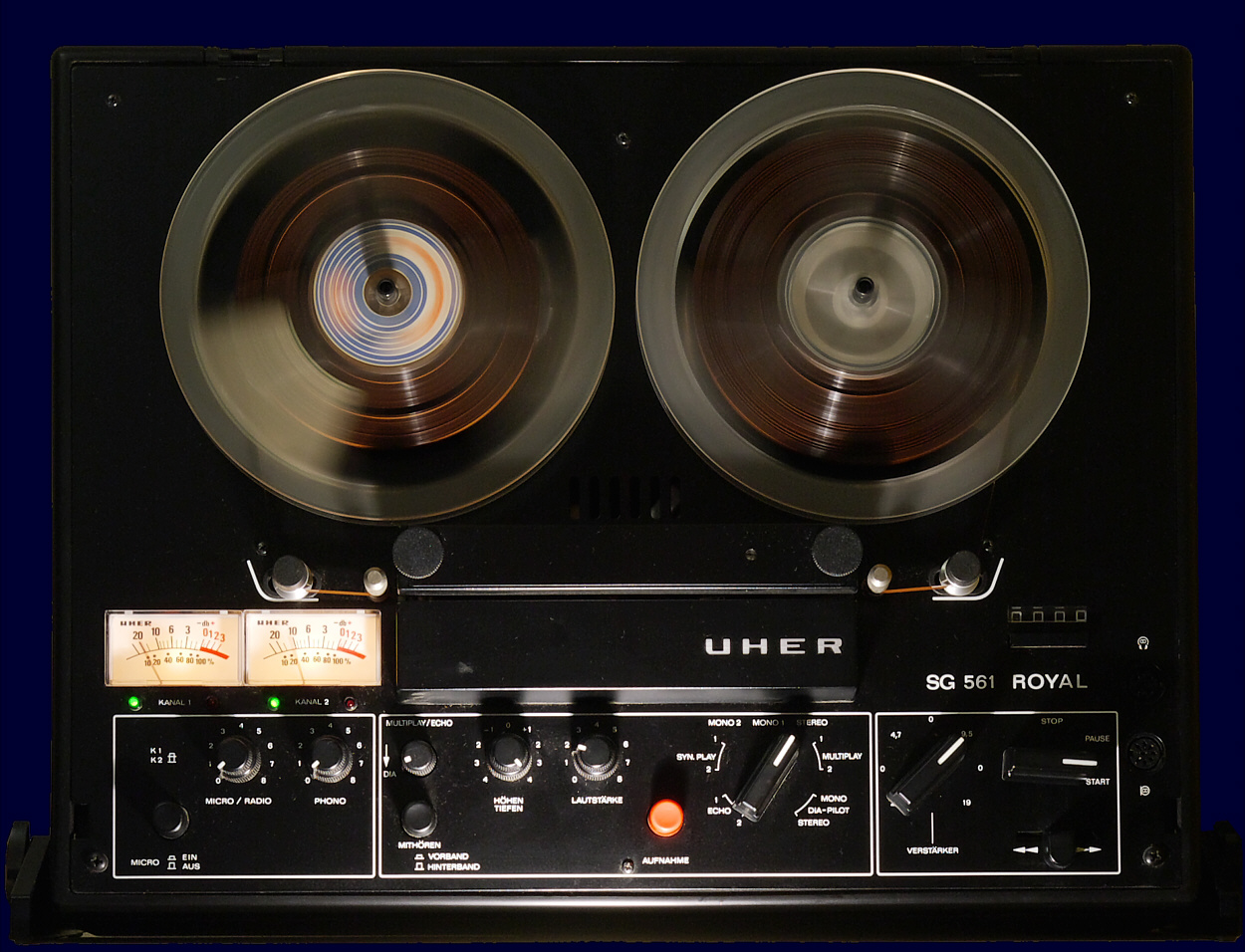 Tonbandgerät Uher SG 561 Royal